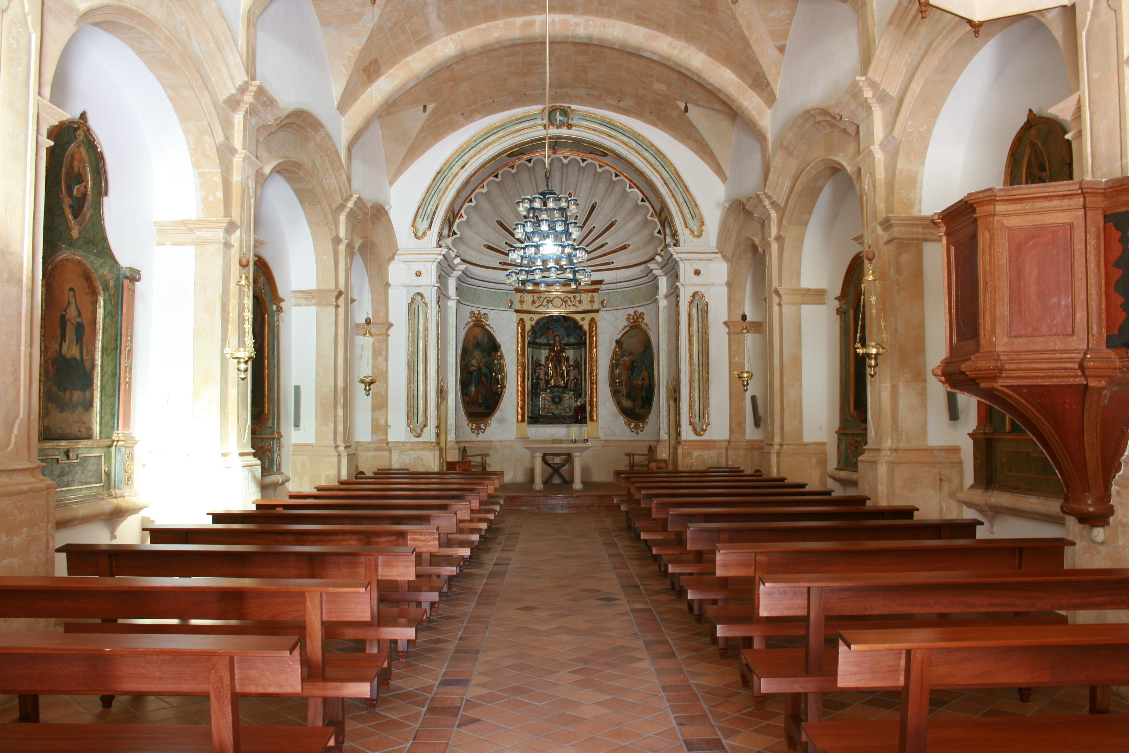 Santuari de Nostra Senyora de Gràcia, Puig de Randa in Algaida, Mallorca